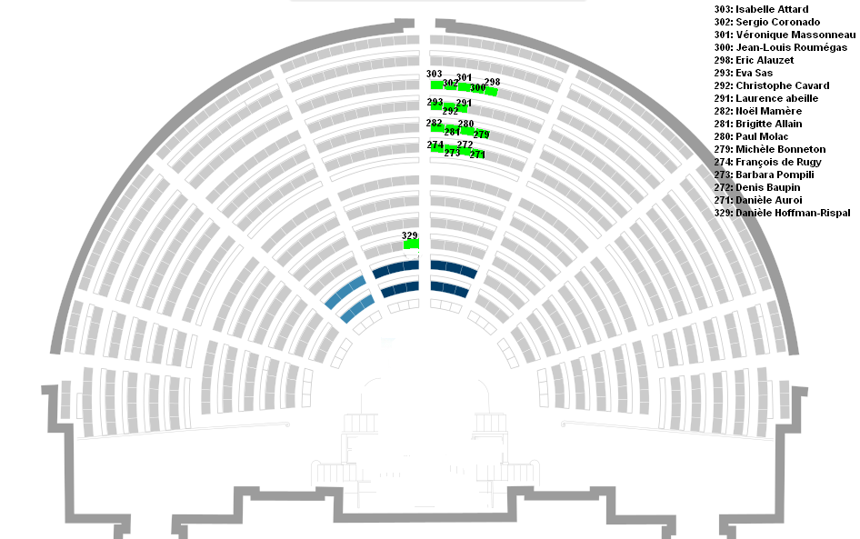 Députés du groupe écologiste dans l'hémicycle à l'Assemblée Nationale de France